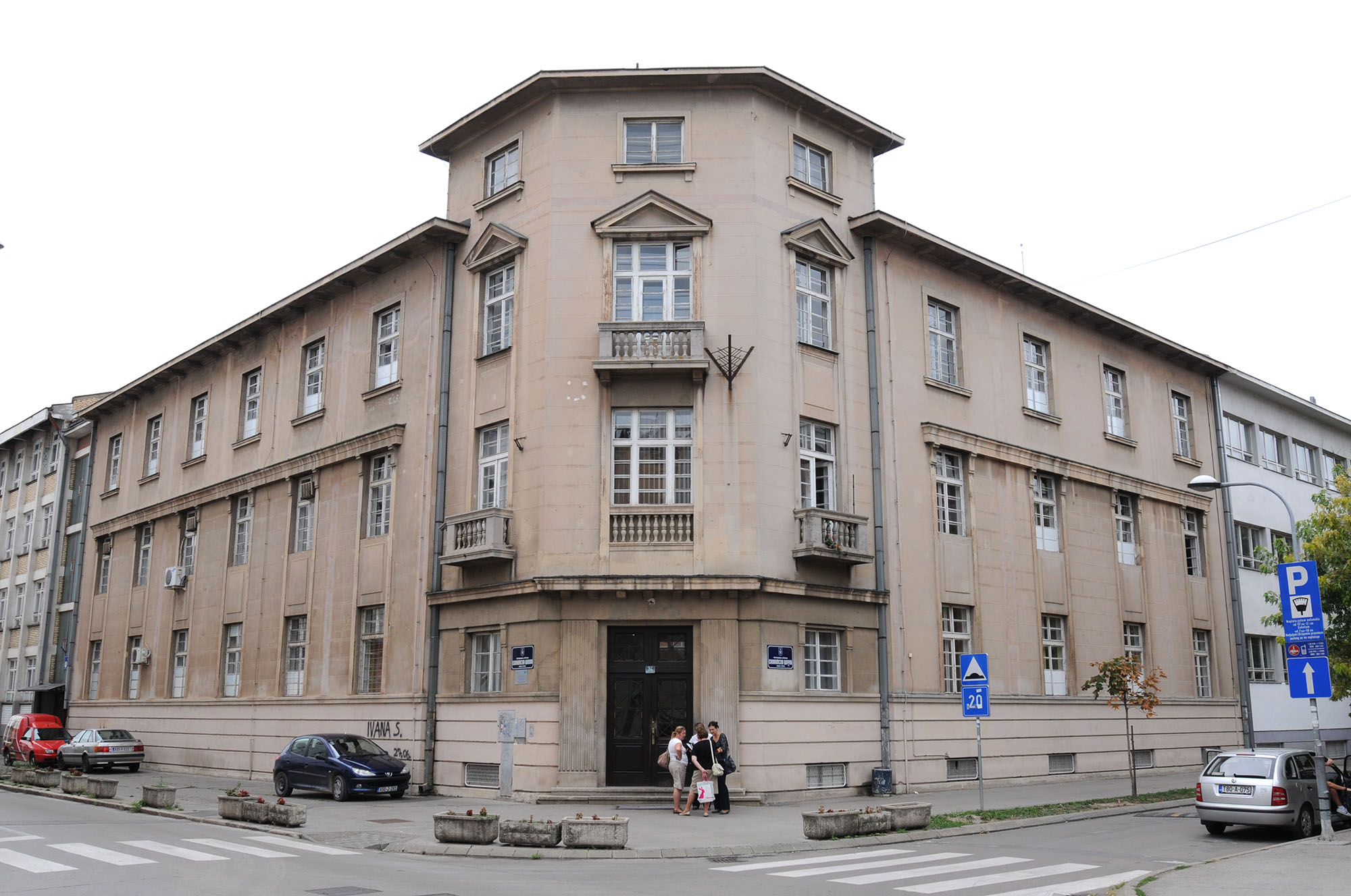 Ekonomska skola Banja Luka This image was uploaded as part of Trace of Soul 2015.